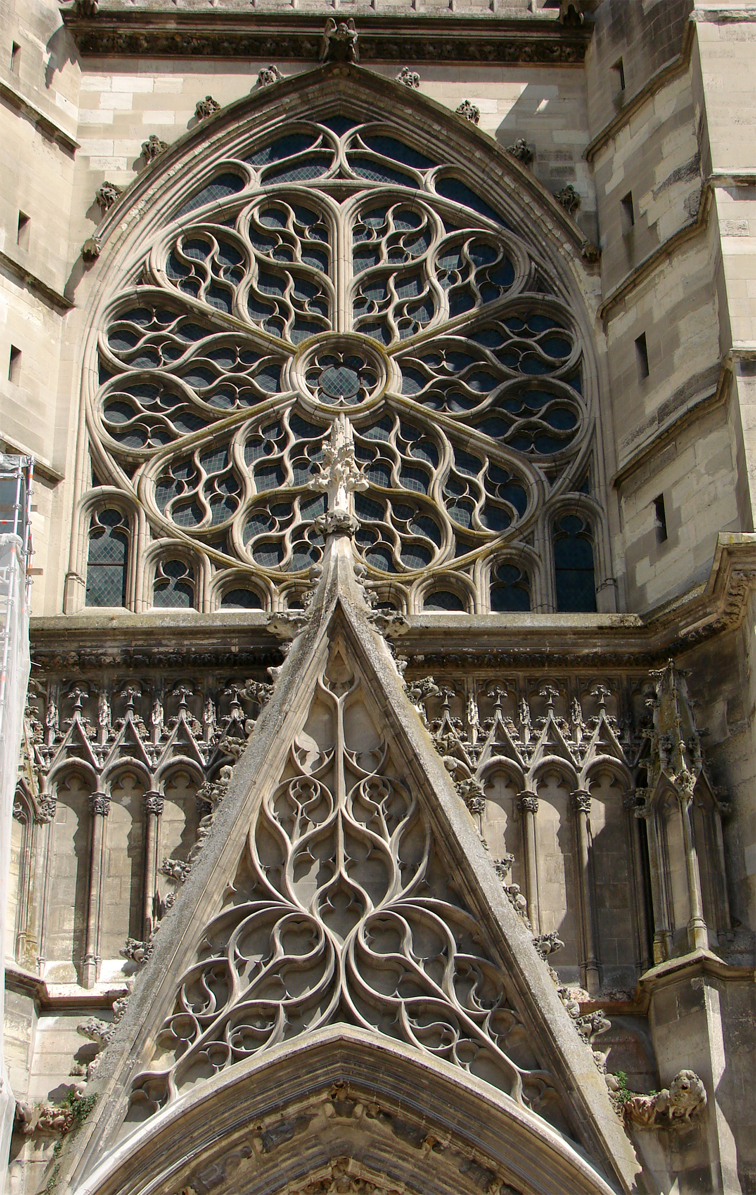 Façade de la cathédrale de Meaux: la rose et le gable du portail central, de style gothique flamboyant.